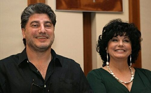 José Cura és Komlósi Ildikó